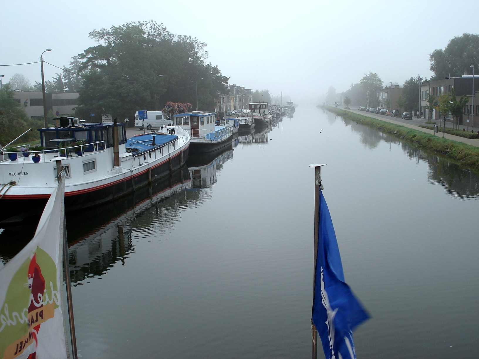 Mechelen (België). Leuvense vaart (of Kanaal Leuven-Dijle), vanop de boot naar Plankendaal.